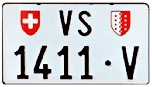 Mietwagennummer Wallis